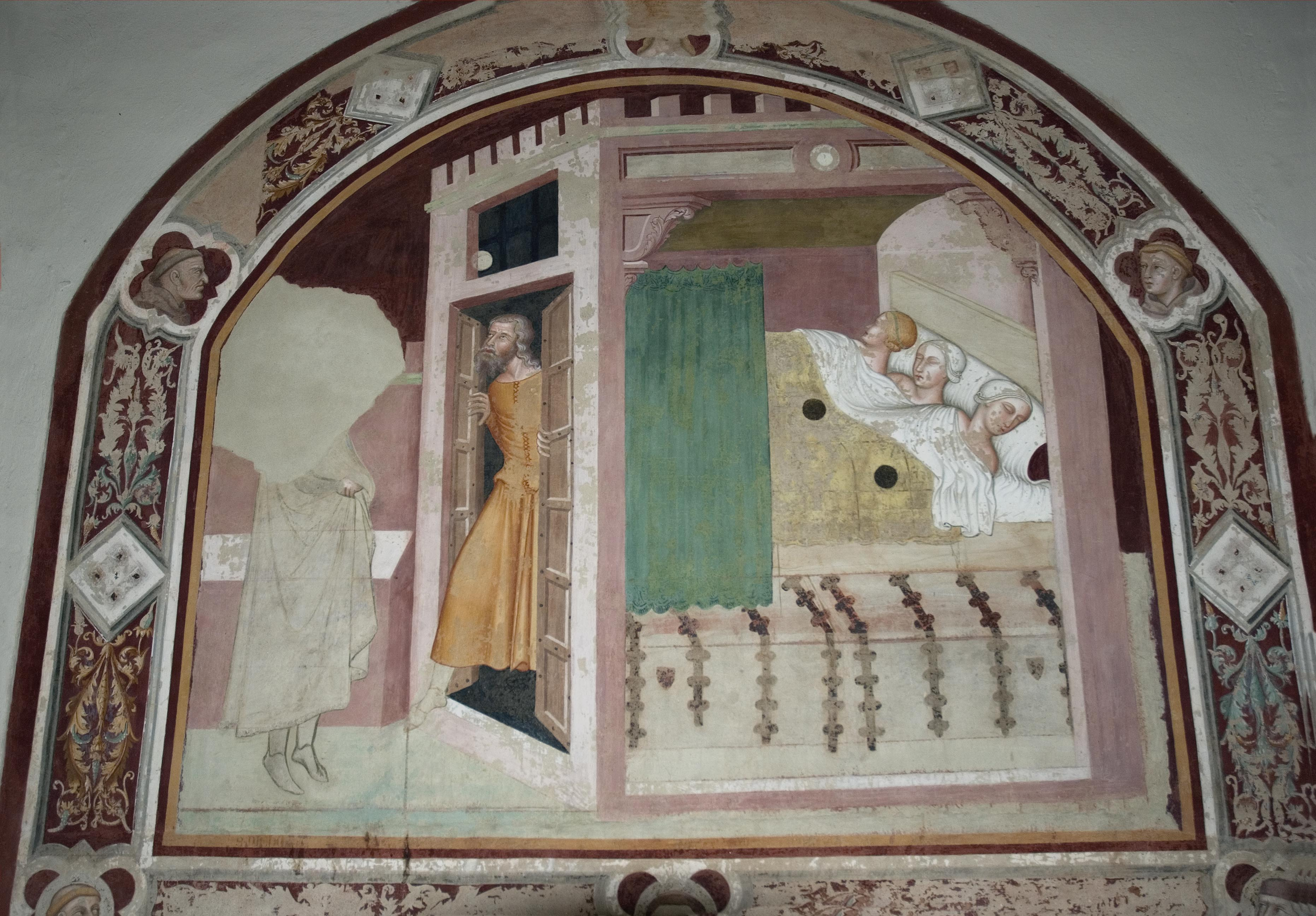 Affresco all'interno della chiesa di San lucchese (Poggibonsi)